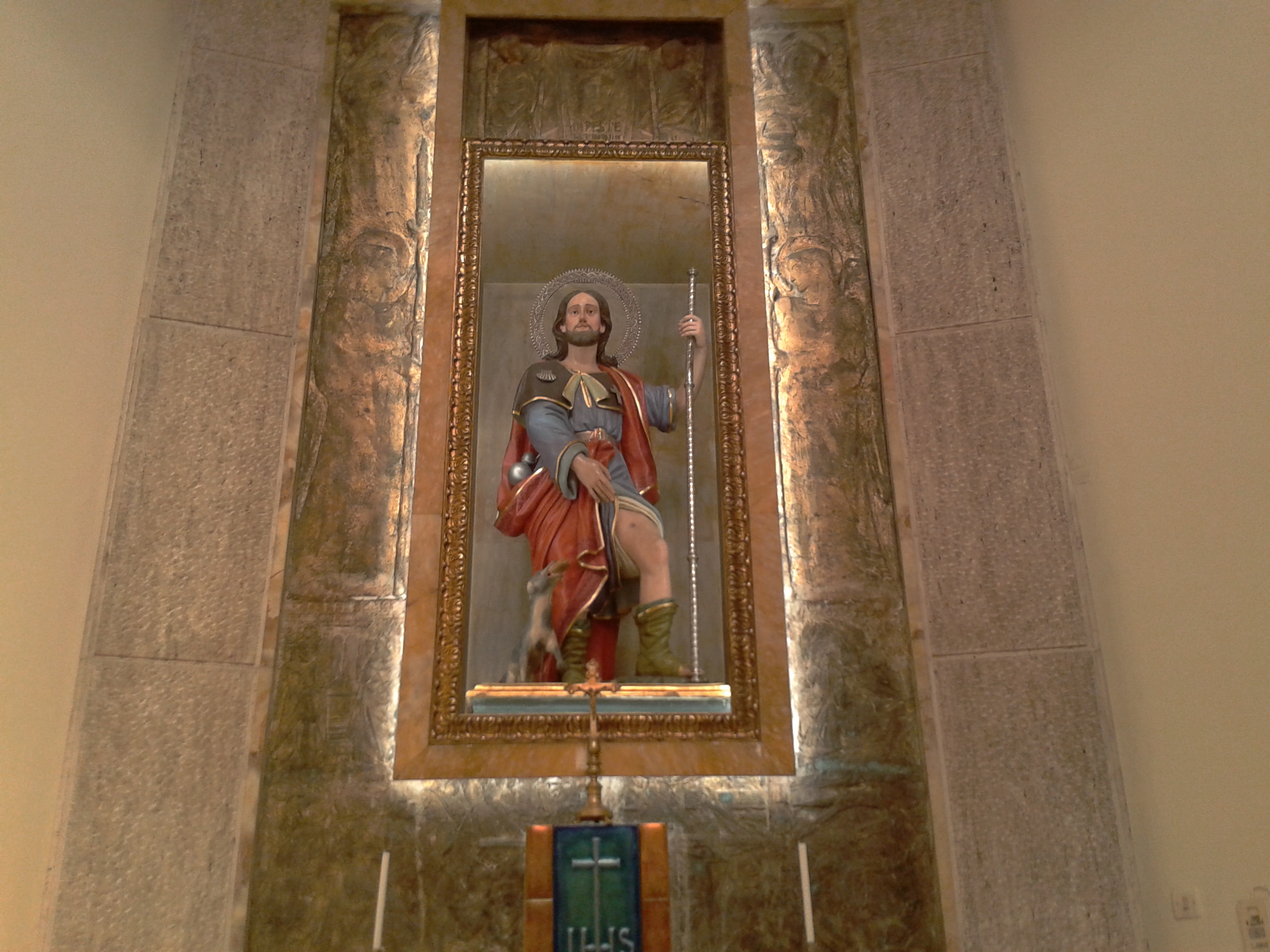 Altare laterale della chiesa dell'Immacolata e San Rocco a Palmi, nel quale è collocata la venerata statua di San Rocco